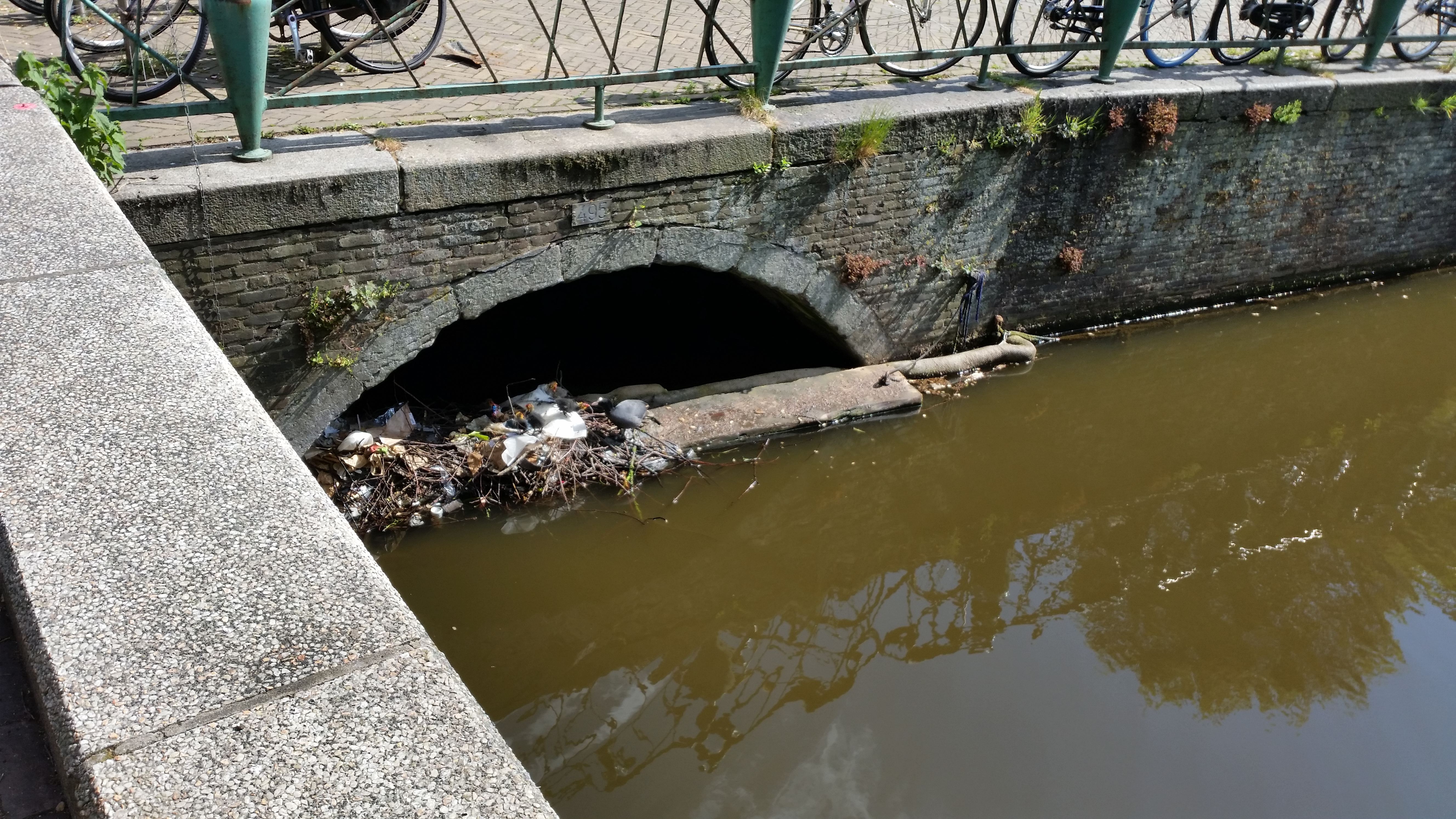 Bijleveldsesluis (brug 495) in Amsterdam loopt onder de Nieuwmarkt door